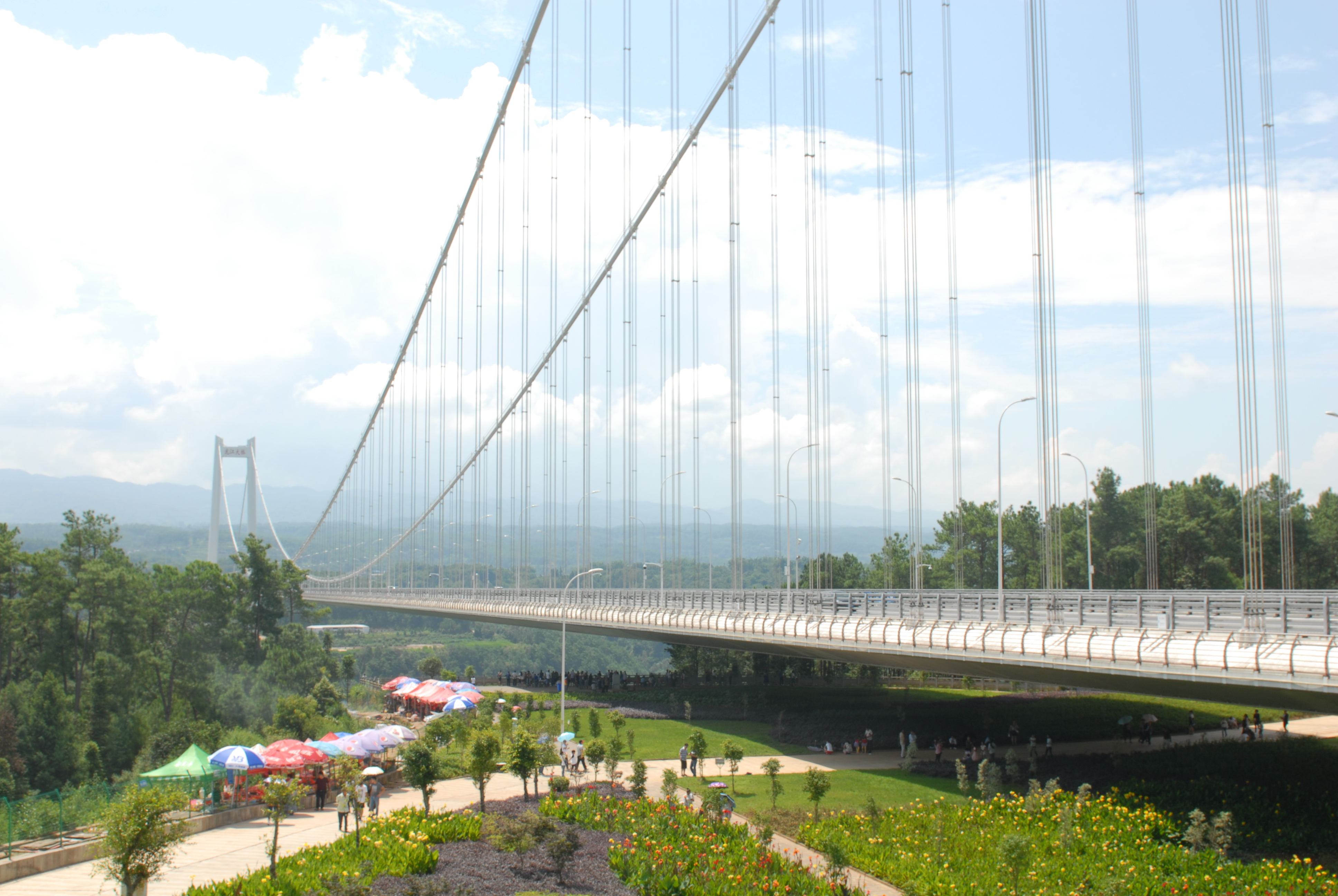 云南省保腾高速龙江特大桥